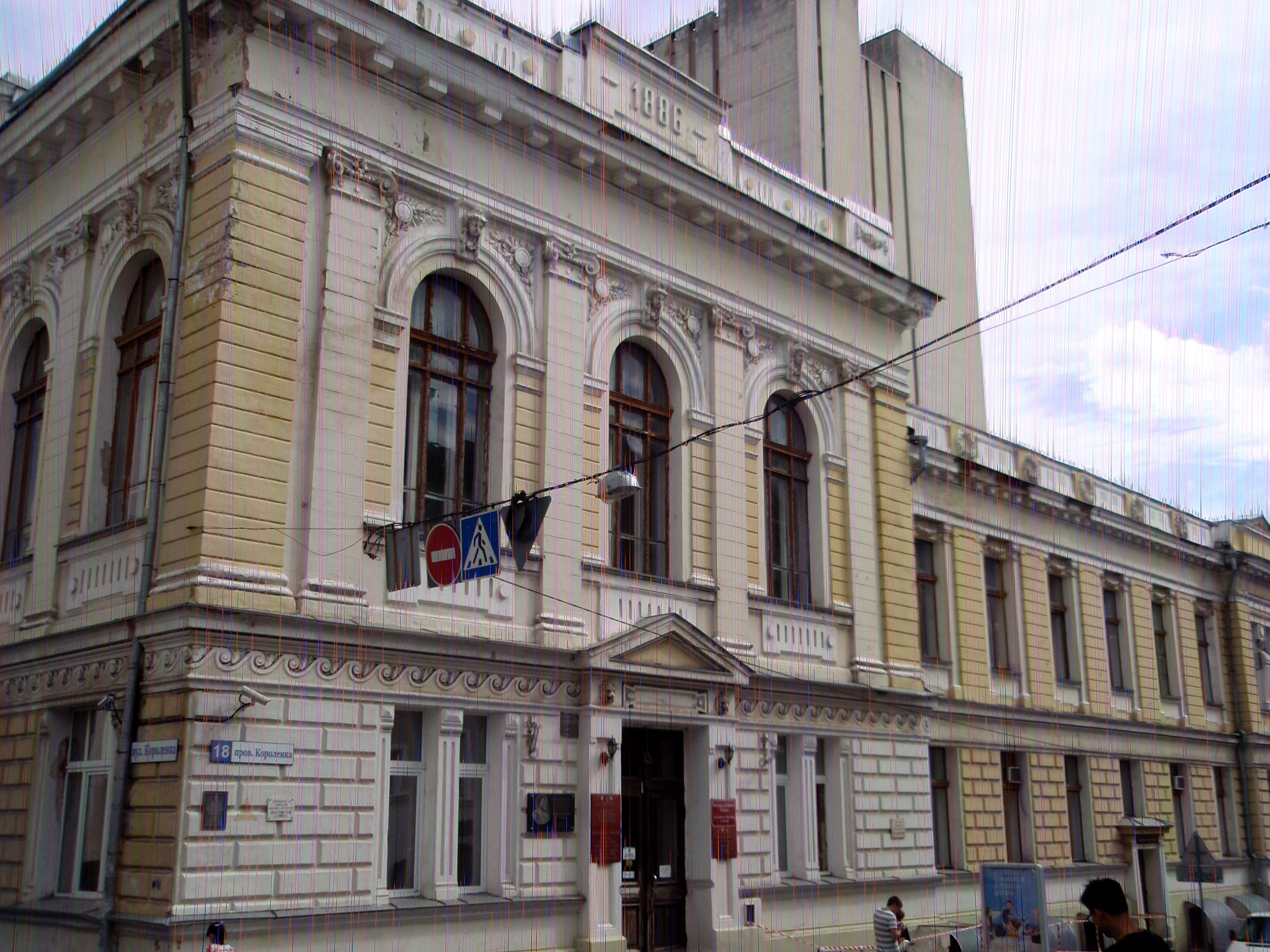 Громадська бібліотека (Наукова бібліотека ім. В.Г. Короленка – одне з найстаріших книгосховищ України), тут виступав Маяковський В.В., Харків, пров. Короленка, 18